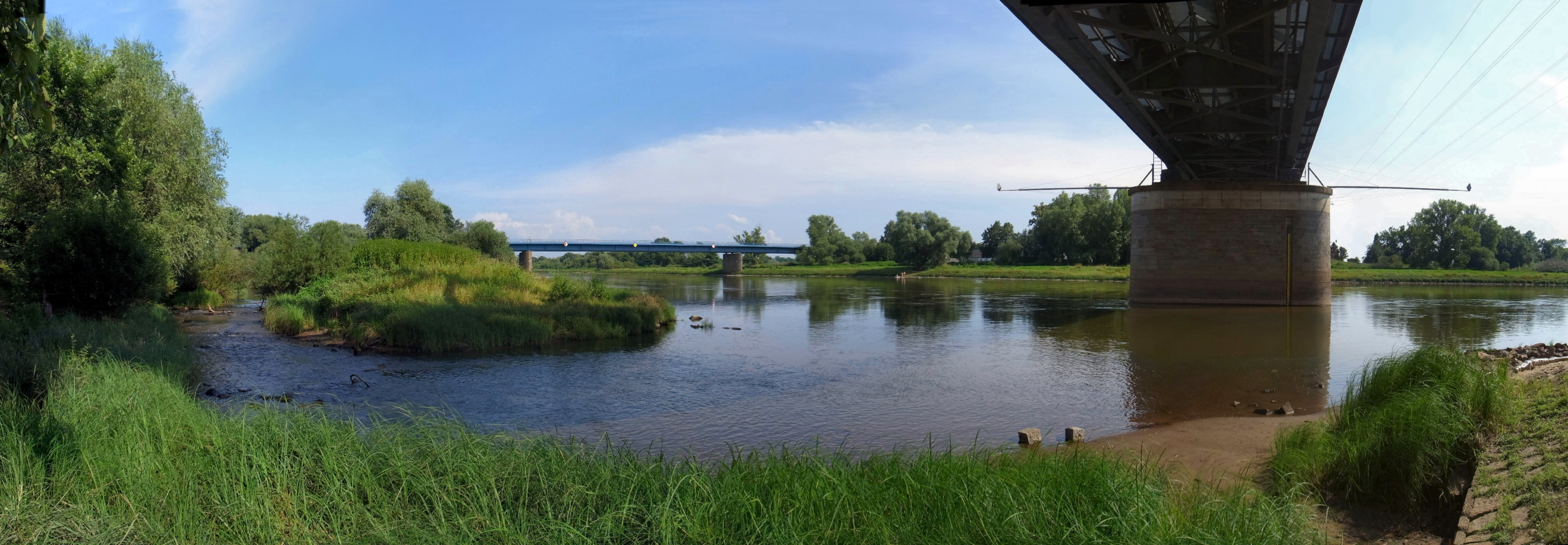 Mündung der Rossel (links) in die Elbe zwischen den Elbebrücken bei Roßlau